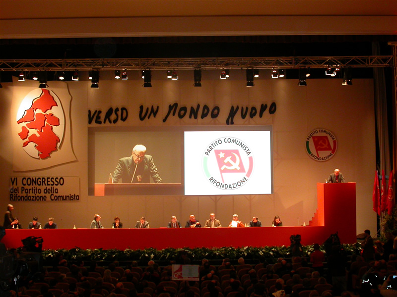 VI Congresso del PRC